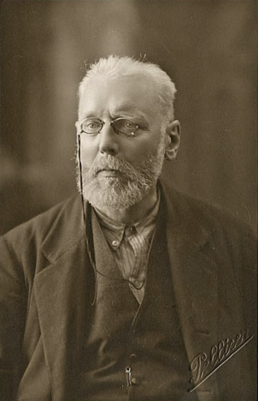 Max Nettlau Portrait 1928